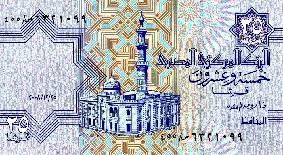 عملة ورقية مصرية من فئة 25 قرشاً.